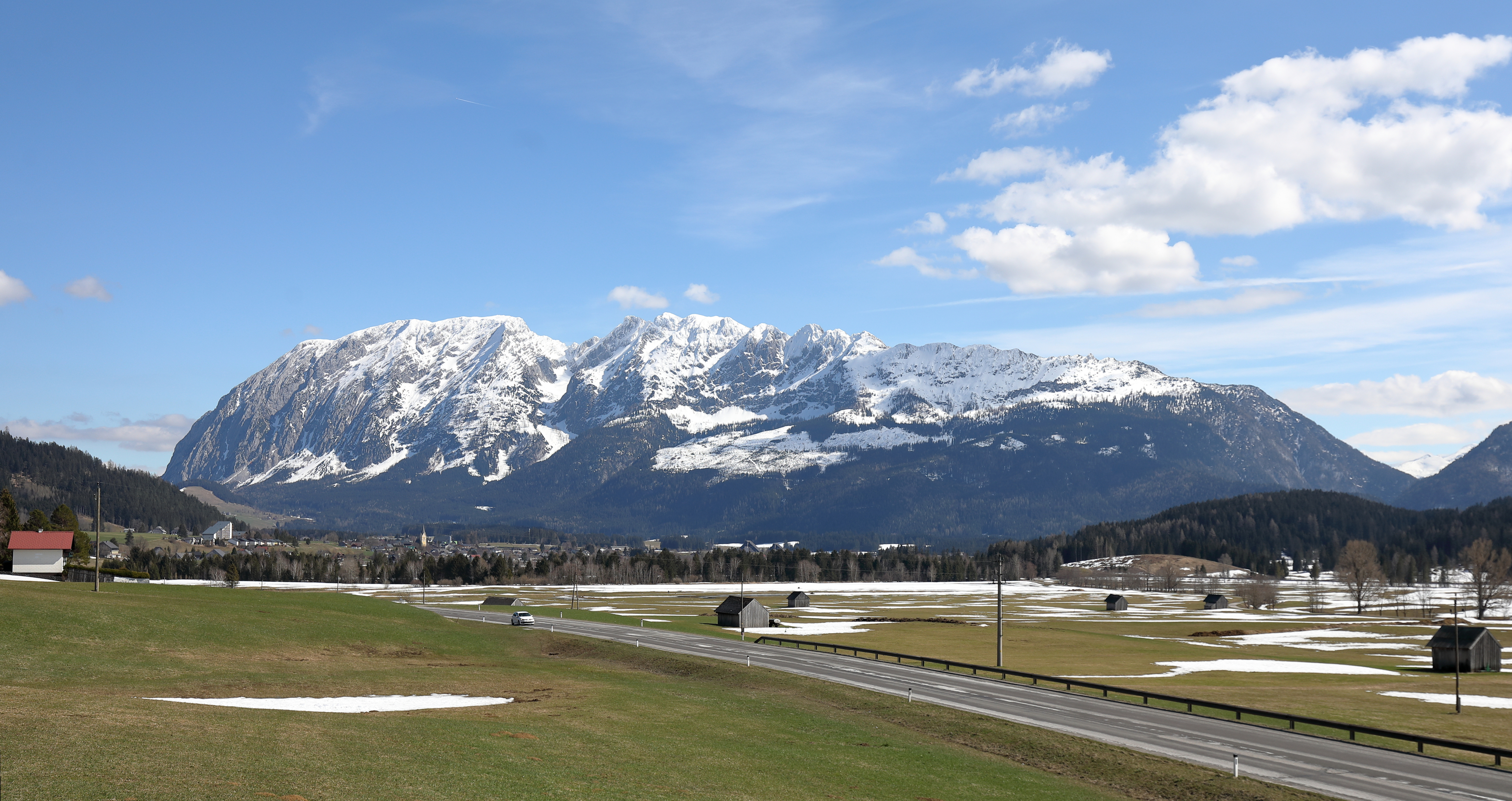 Nordwestansicht des Gebirgsstockes Grimming in der Steiermark.Der isolierte Gebirgsstock befindet sich zwischen dem Dachsteingebirge, dem Toten Gebirge sowie den Niederen Tauern und wird zum Dachsteingebirge gezählt. Markante Höhen sind von Nordosten: Multereck (2176 m), (Hoher) Grimming (2351 m), Schartenspitze (2328 m), Steinfeldspitze (2290 m), Zwölfer (2146 m), Krautschwellereck (1959 m), Zehnerspitze (1879 m) und Mittereck (1695 m).